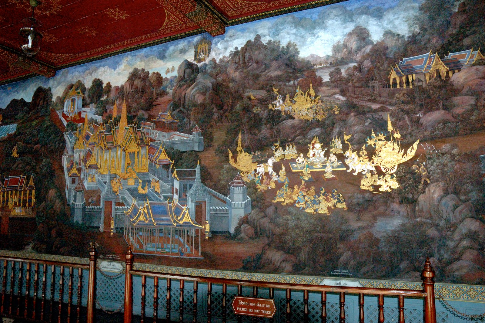 Silom, Bang Rak, Bangkok, Thailand